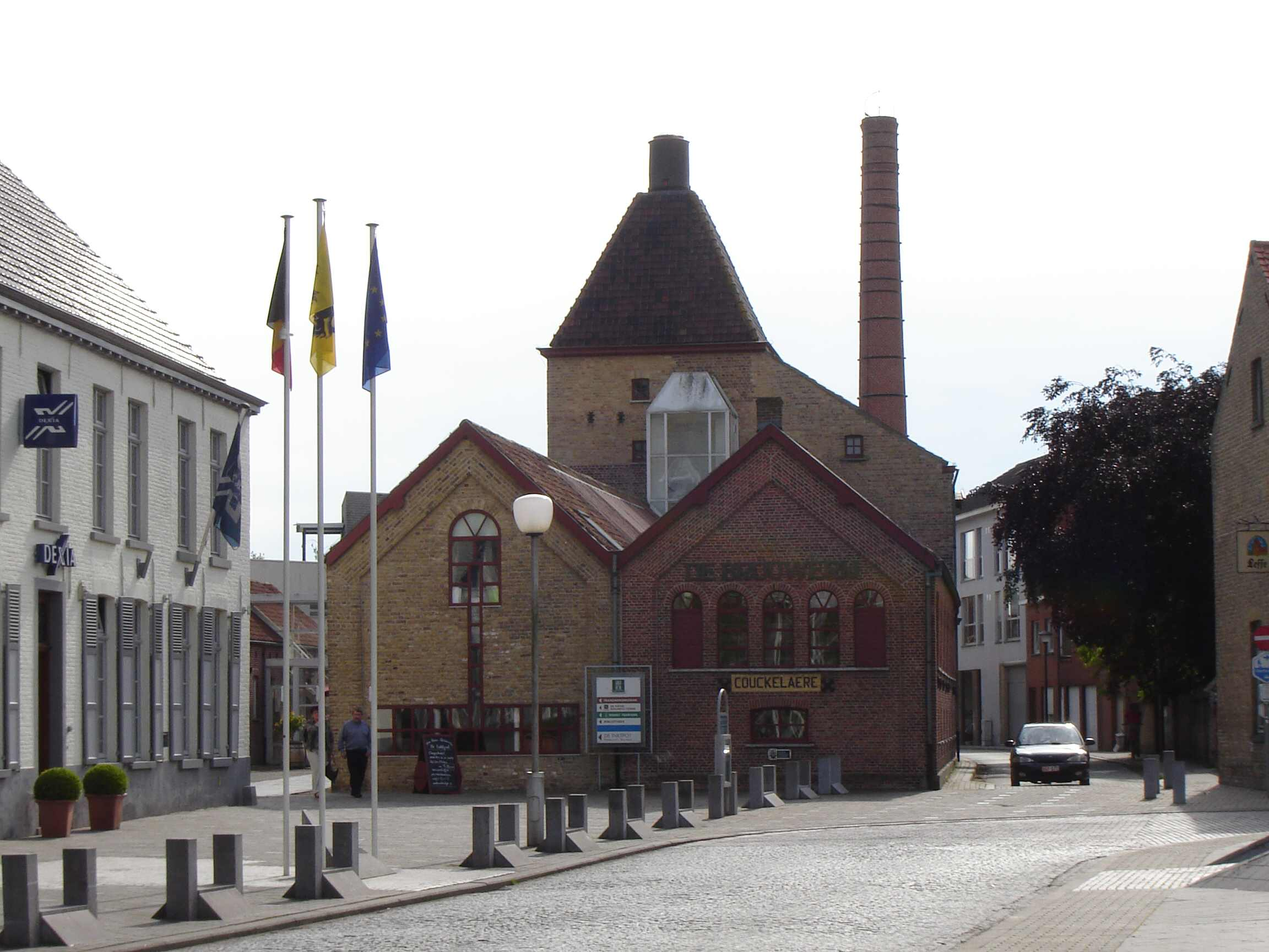 Renovated Brewery at market square of Koekelare, West-Flanders, Belgium